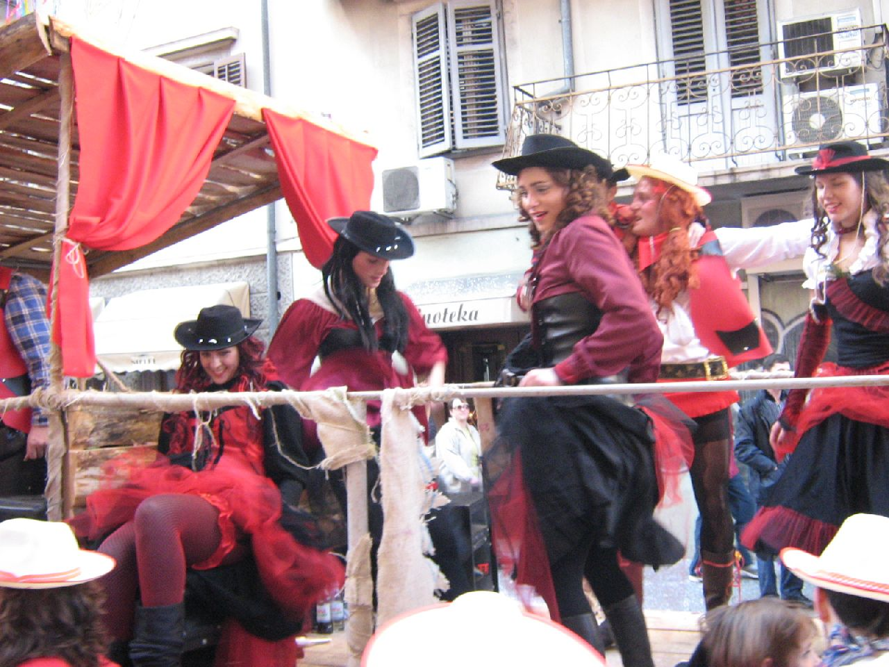 Rijeka Carnival – Masked ball 3